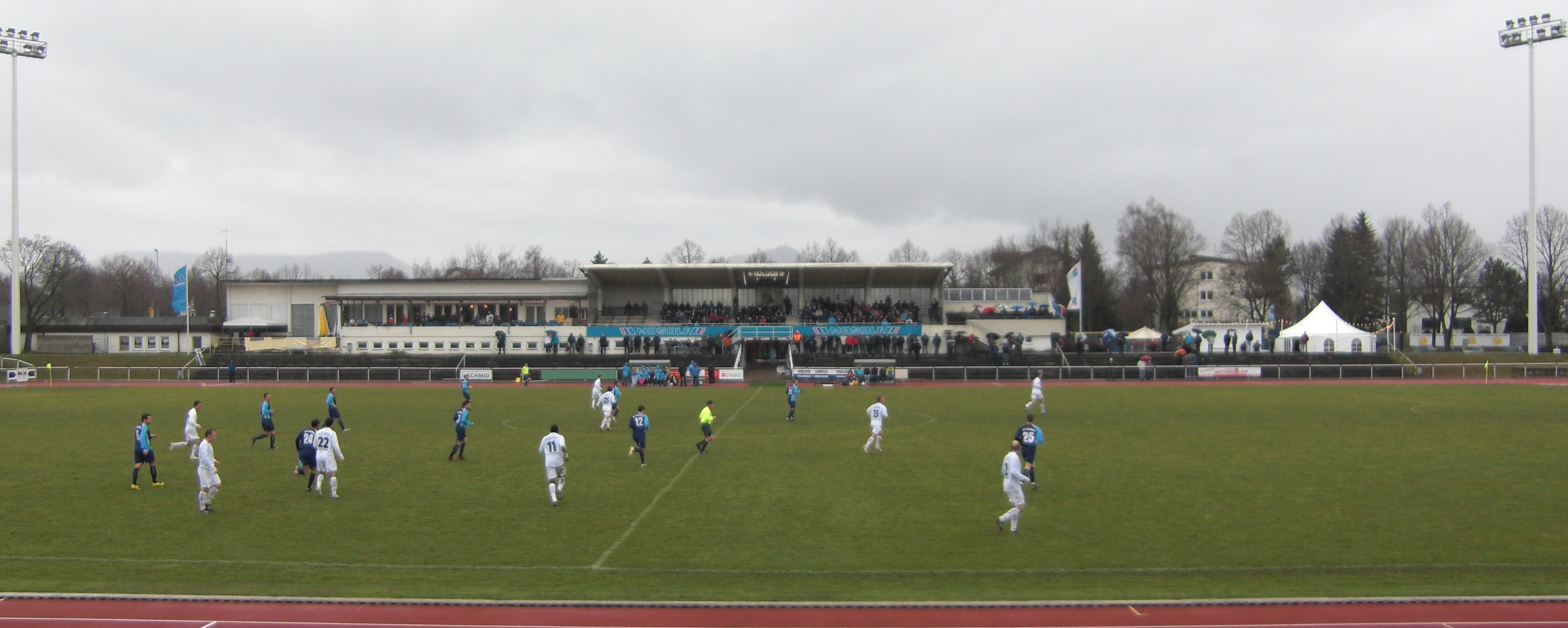 Stadion an der Jesinger Allee (Kirchheim unter Teck) 2009